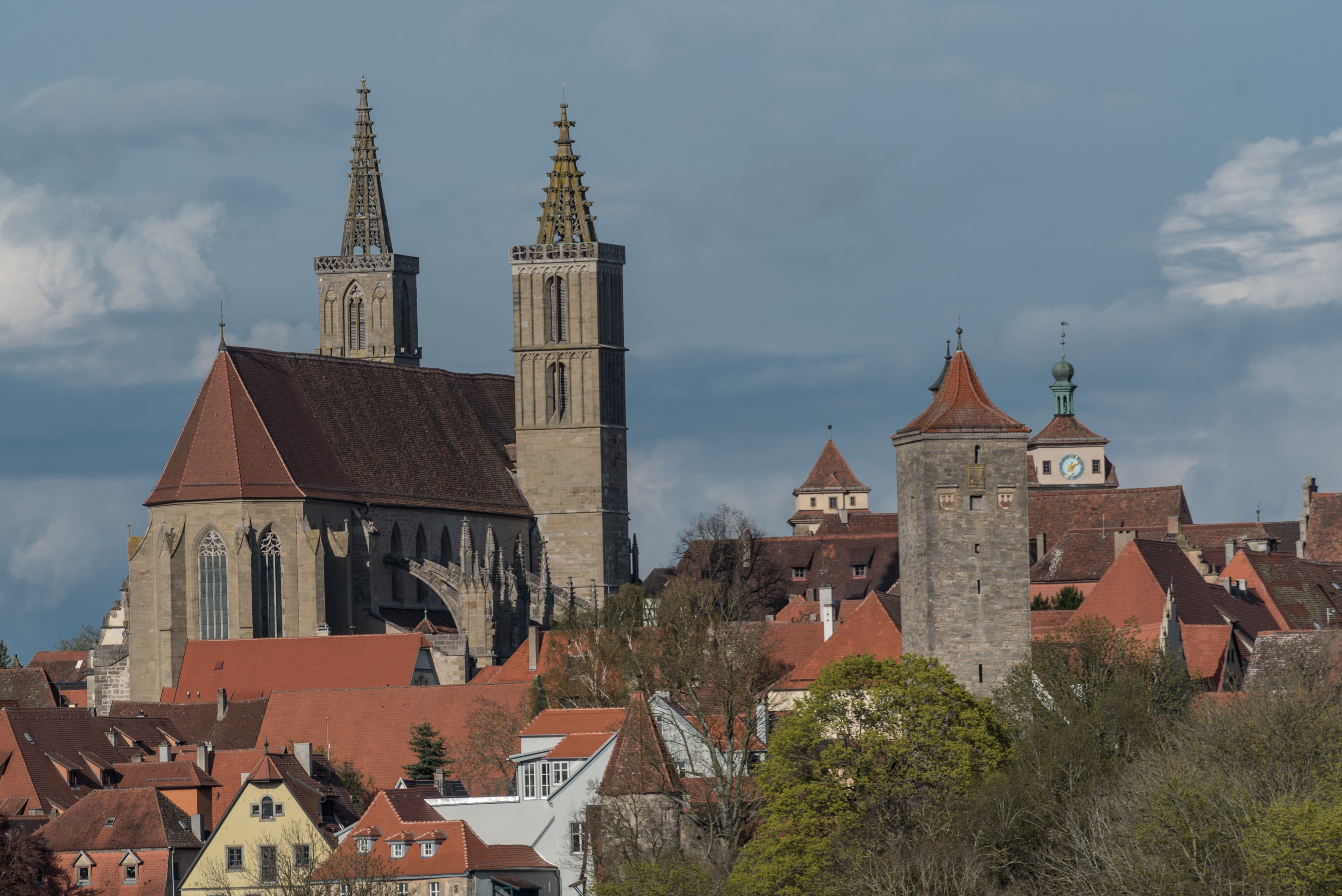 Rothenburg ob der Tauber, Panorama von Westen